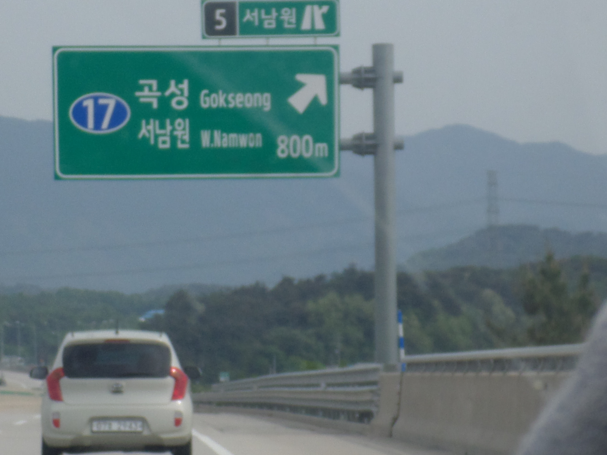 서남원IC 진출 표지판